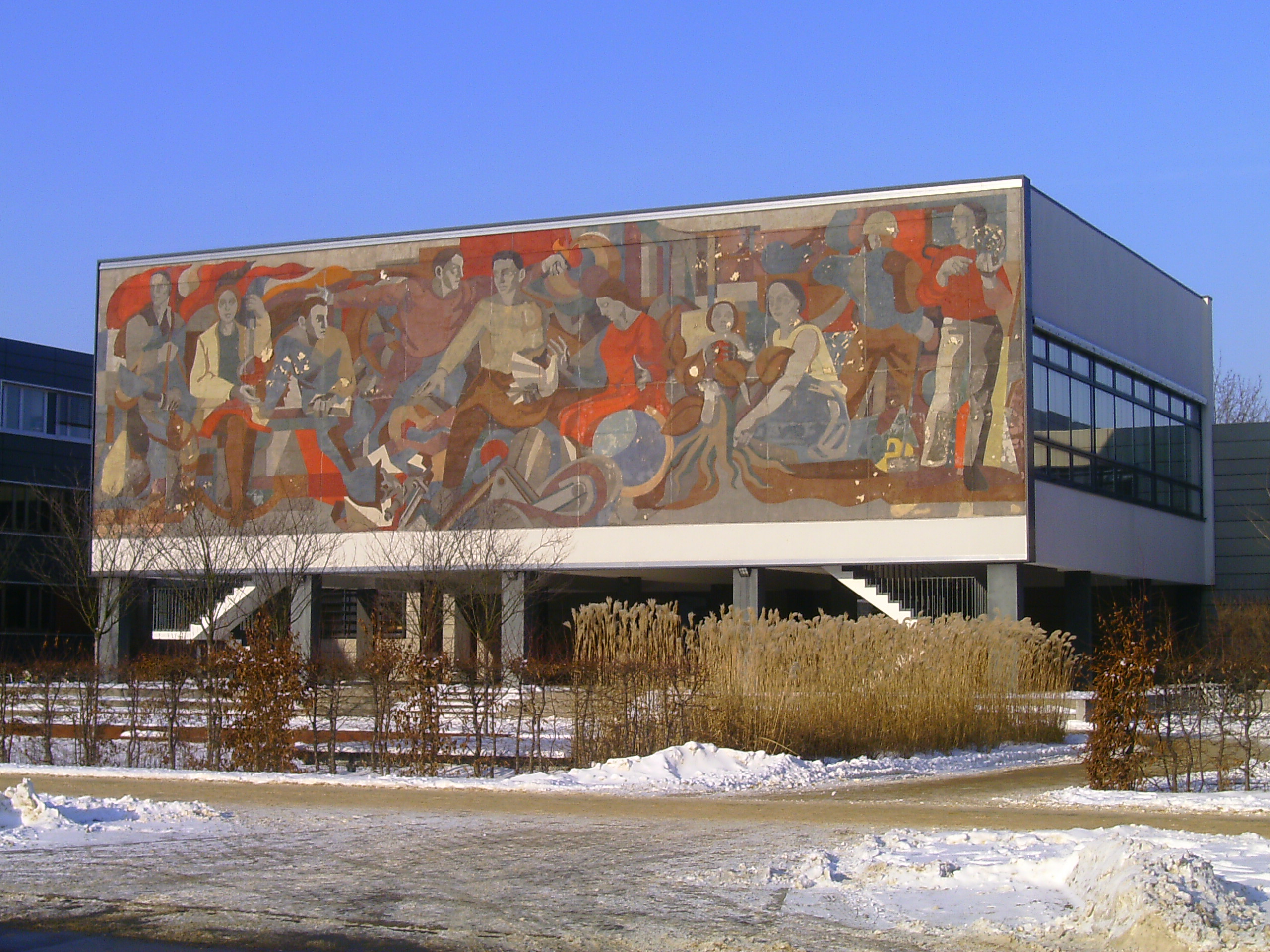 Fassadenbild Mensch und Bildung von Gerhard Bondzin am Lehrgebäude der Fakultät für Architektur